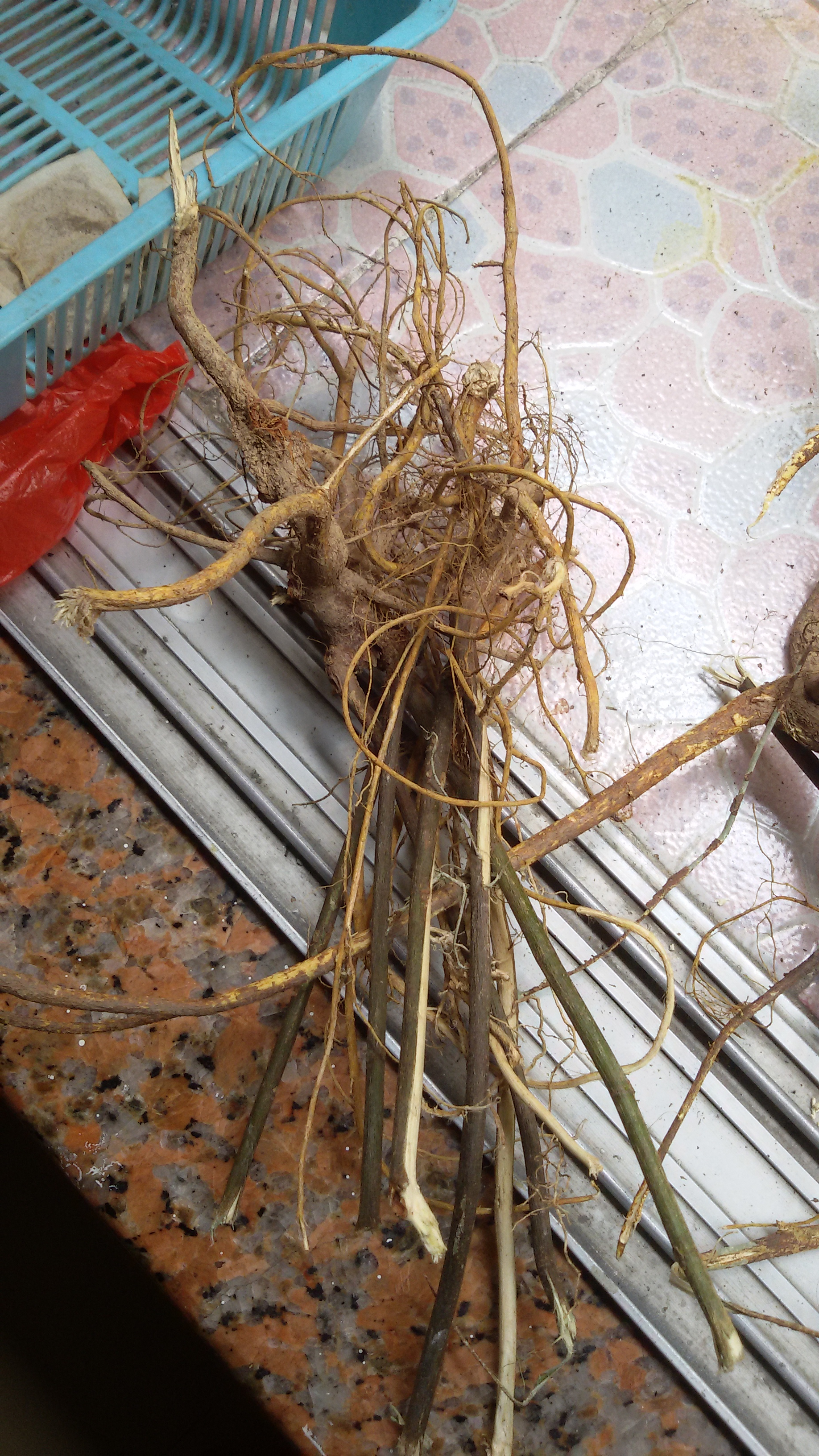 粵語: 五指毛桃嘅药材部位